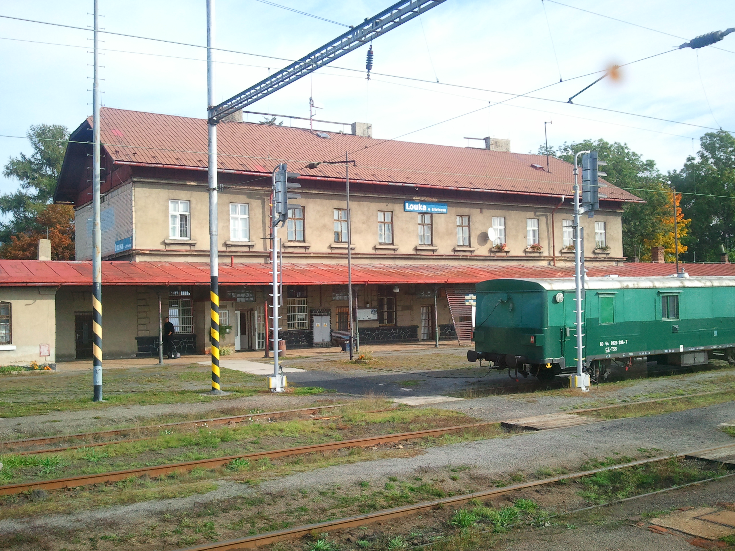 Železniční trať Most - Dubí - Moldava, část Louka u Litvínova - Moldava (Louka u Litvínova), Louka u Litvínova